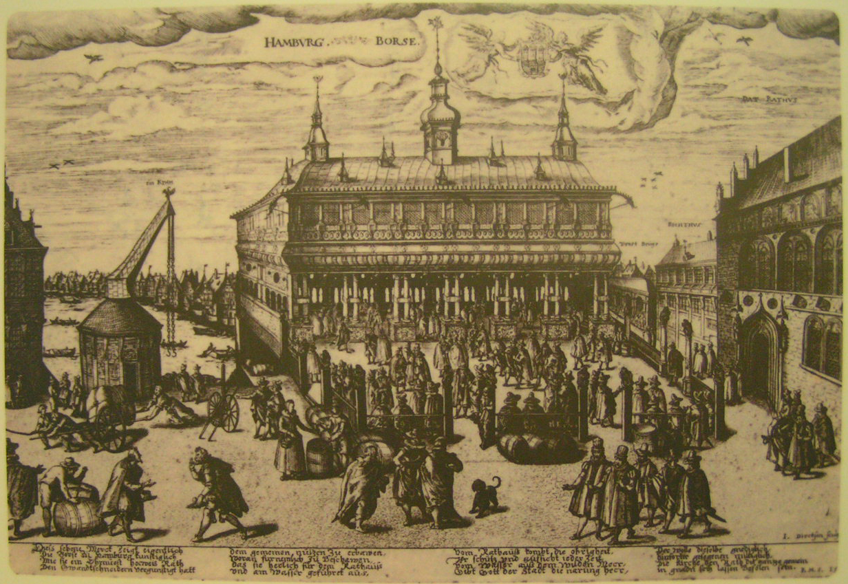 Hamburger Boerse 1606